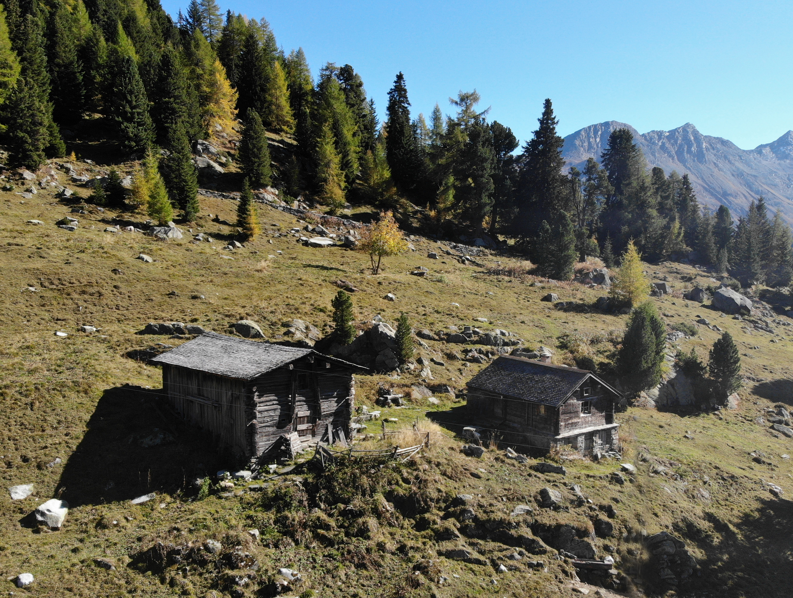 Alphütte aus Heidi (2015, Film) oberhalb Sufers